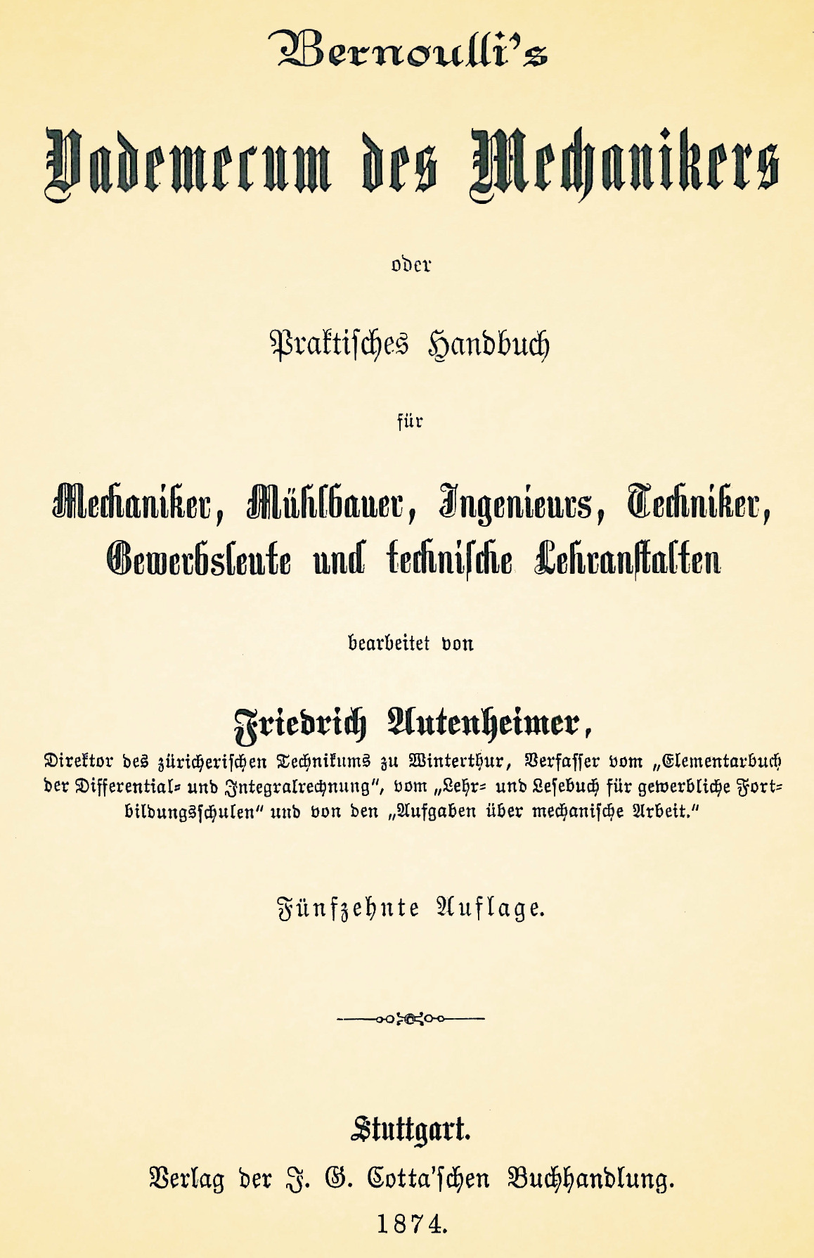 Bernoullis Vademecum des Mechanikers (1874)